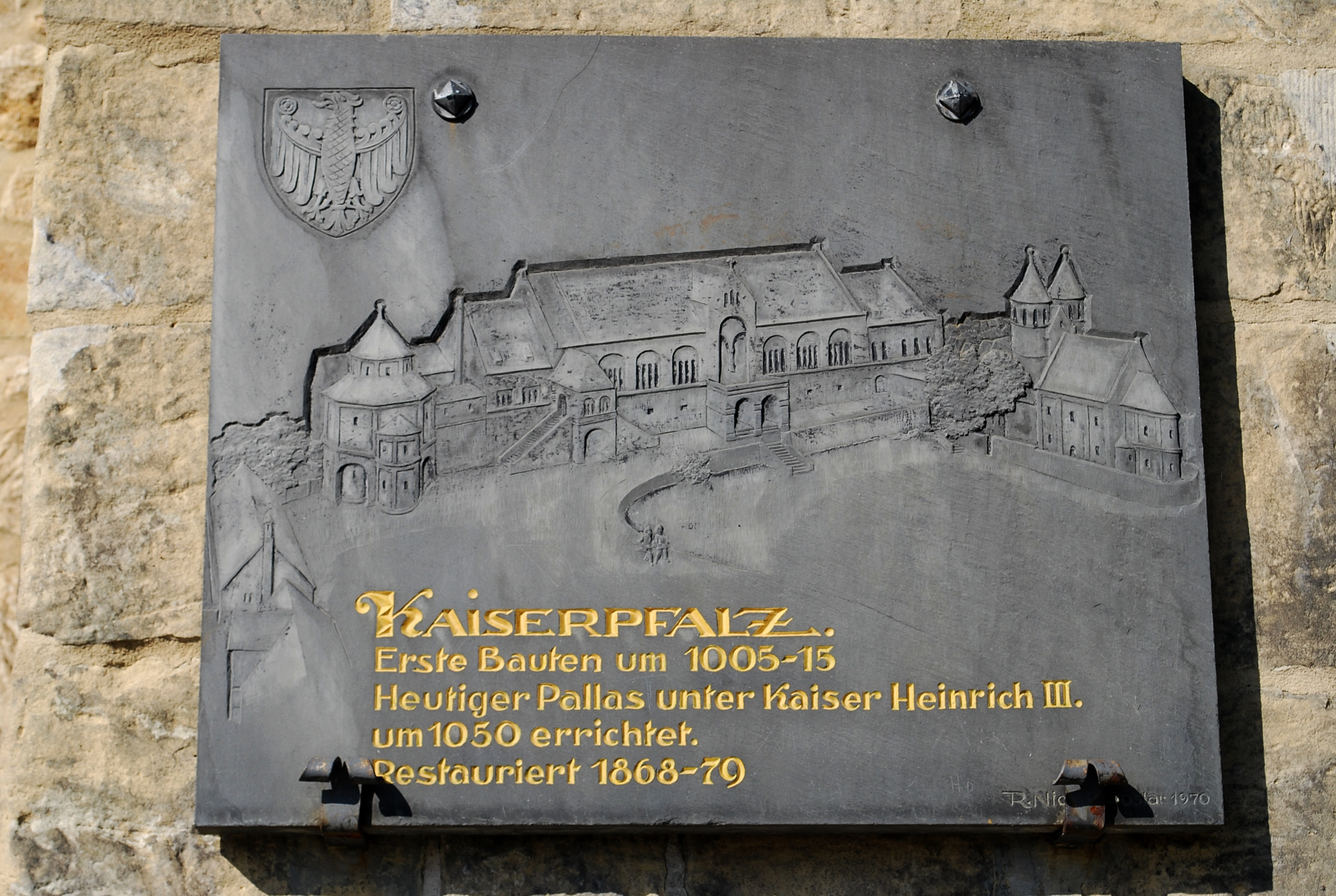 Описание дворца